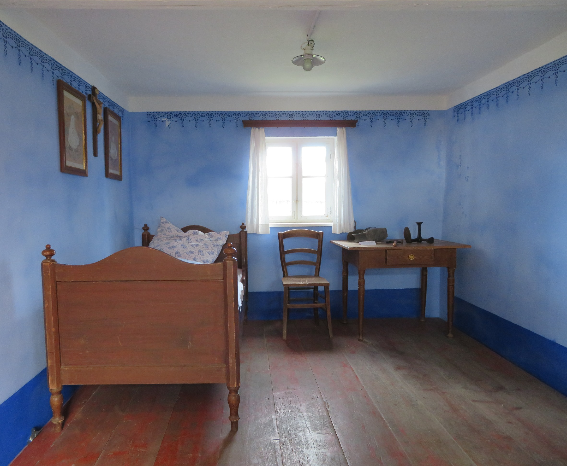 Haus im Moos, Austragsstübchen eines alten Schusters